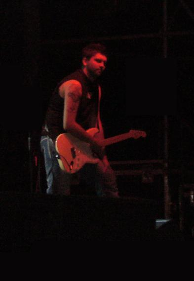 Piotr Konca podczas koncertu IRA w 2007 roku